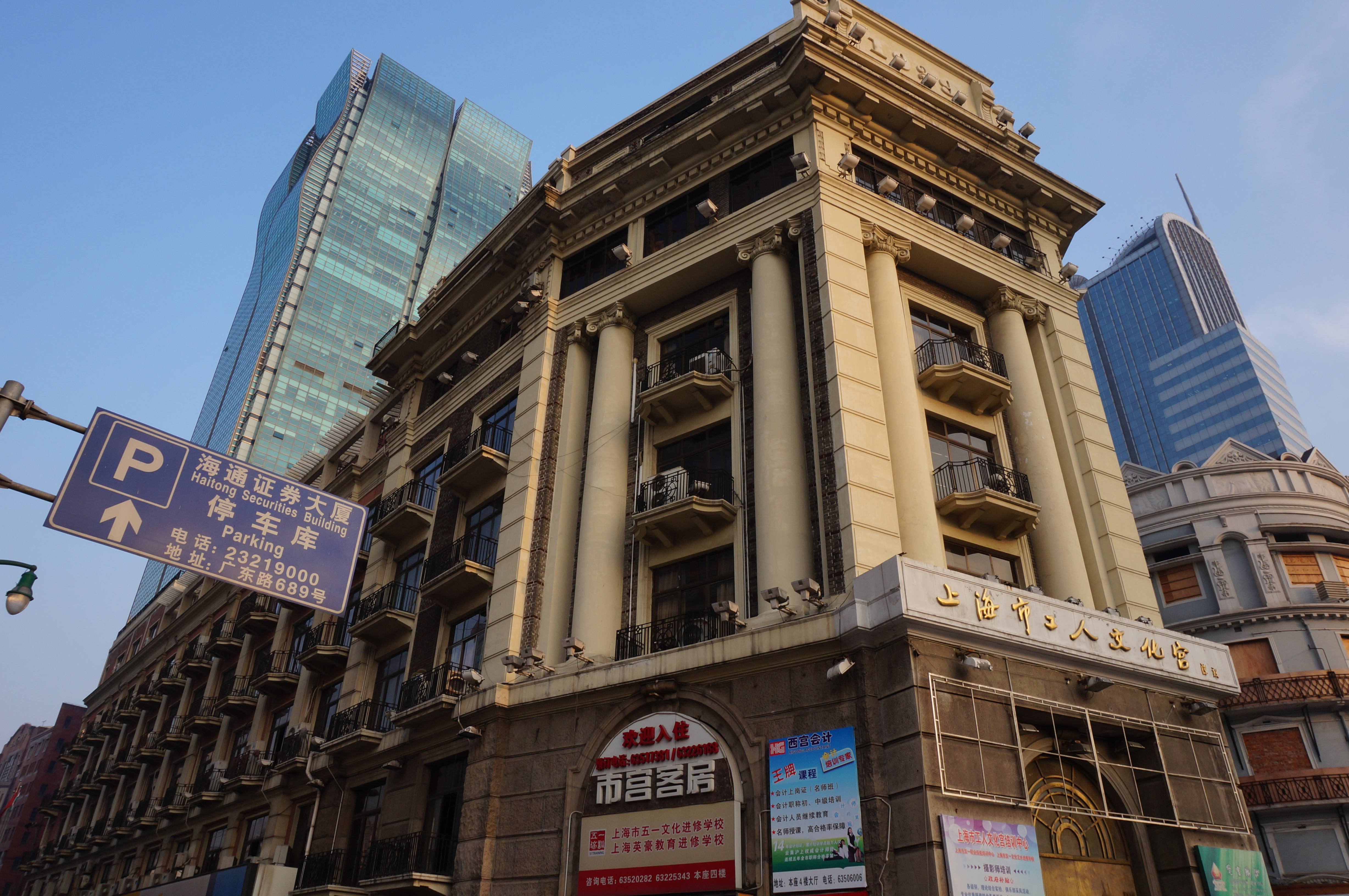 中文（中国大陆）: 原上海东方饭店